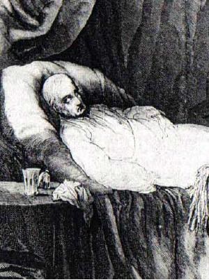 Humboldt im Sterbebett (Ausschnitt) Original: Der Prinzregent von Preußen am Sterbebett Alexander v. Humboldts Standort: Original heute Stadtmuseum Berlin